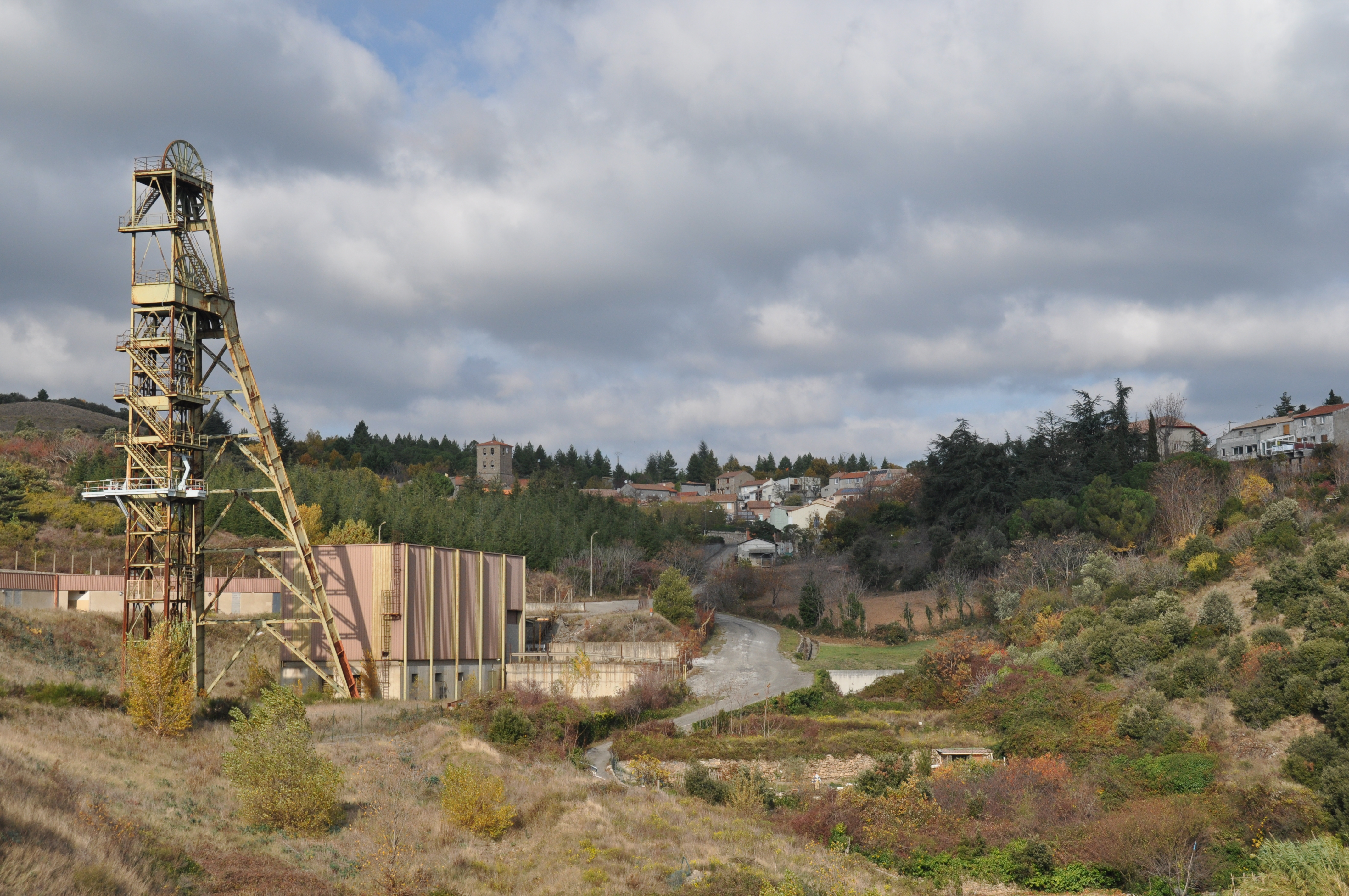 Site du puits Castan et village de Villanière